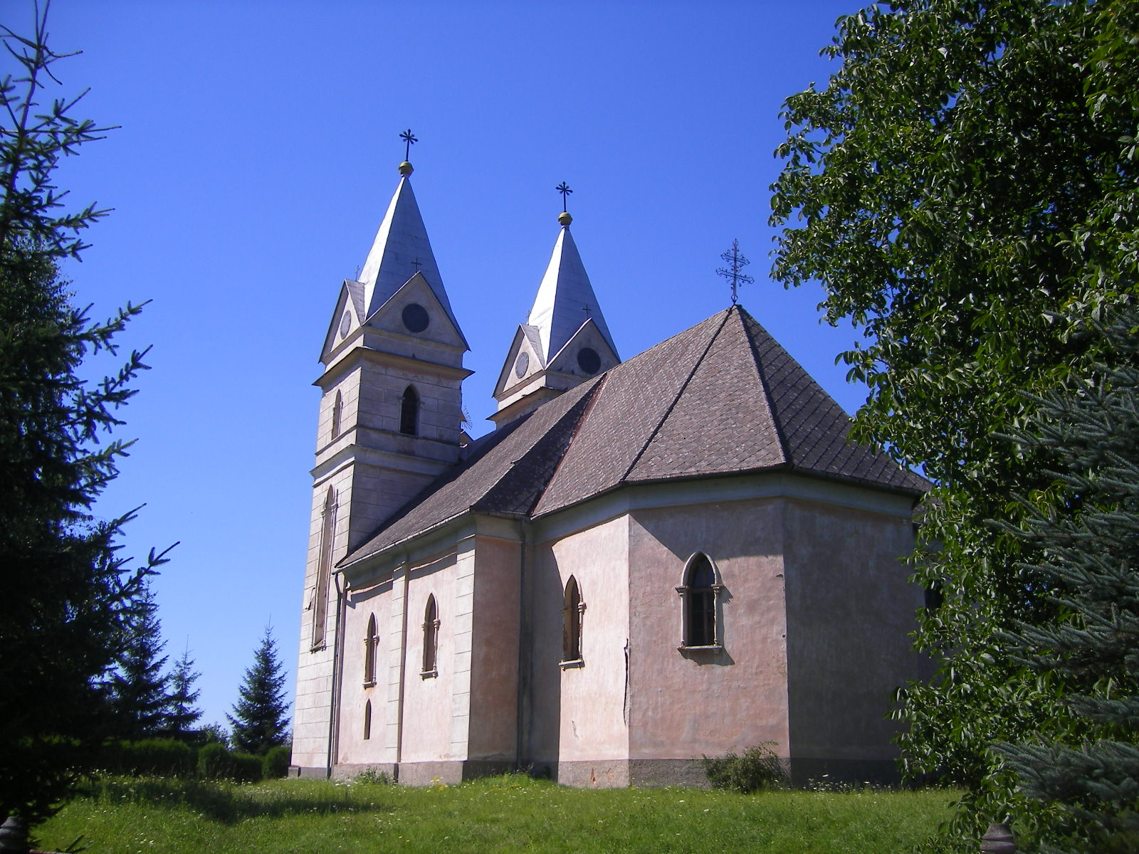 Várhosszúrét - Szent György katolikus templom